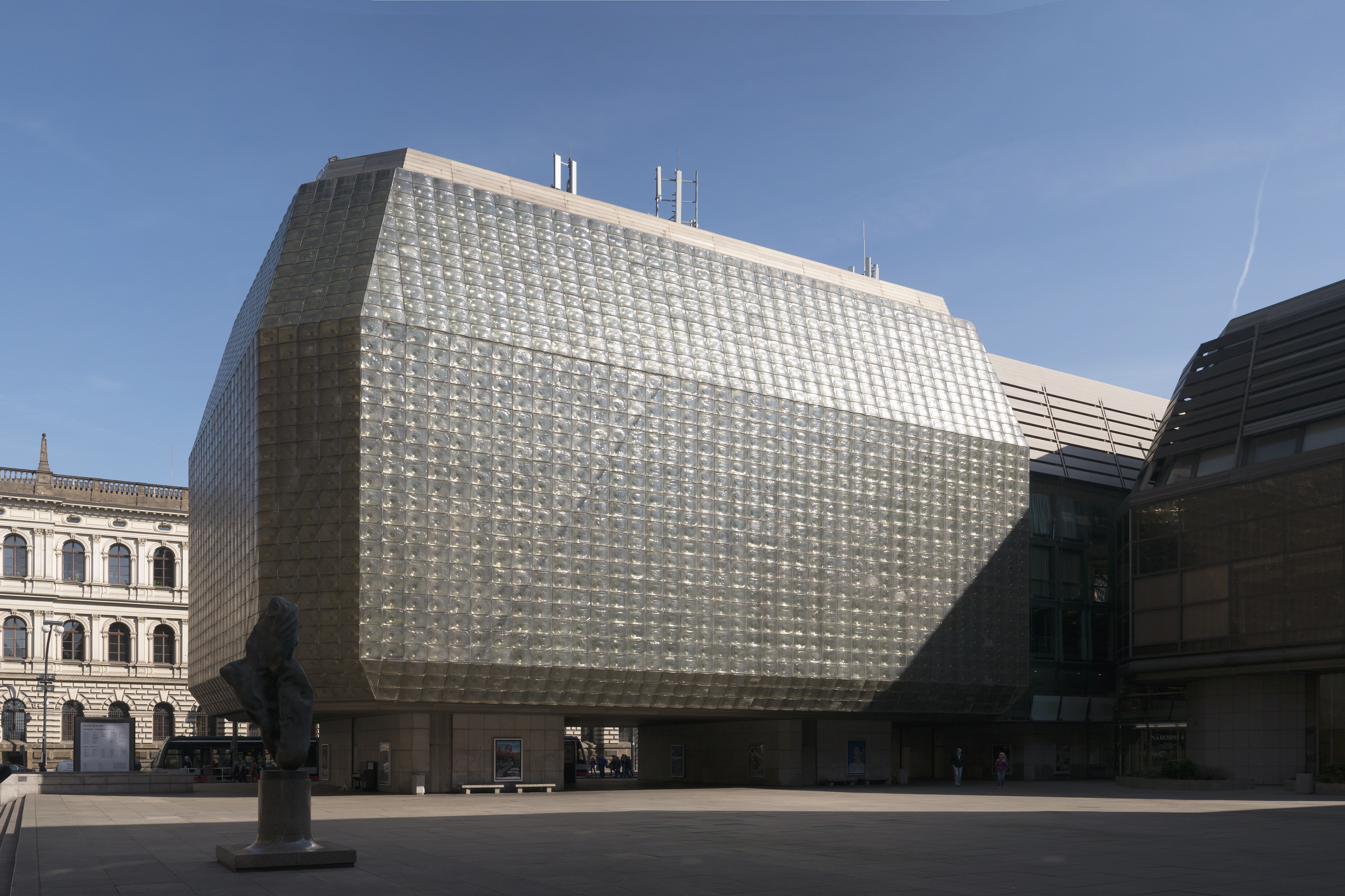 Prag Neue Szene (Nationaltheater)